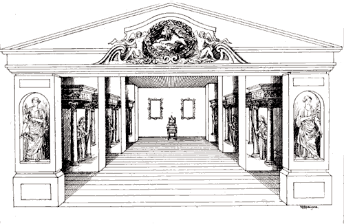 Escenario coliseo buen retiro